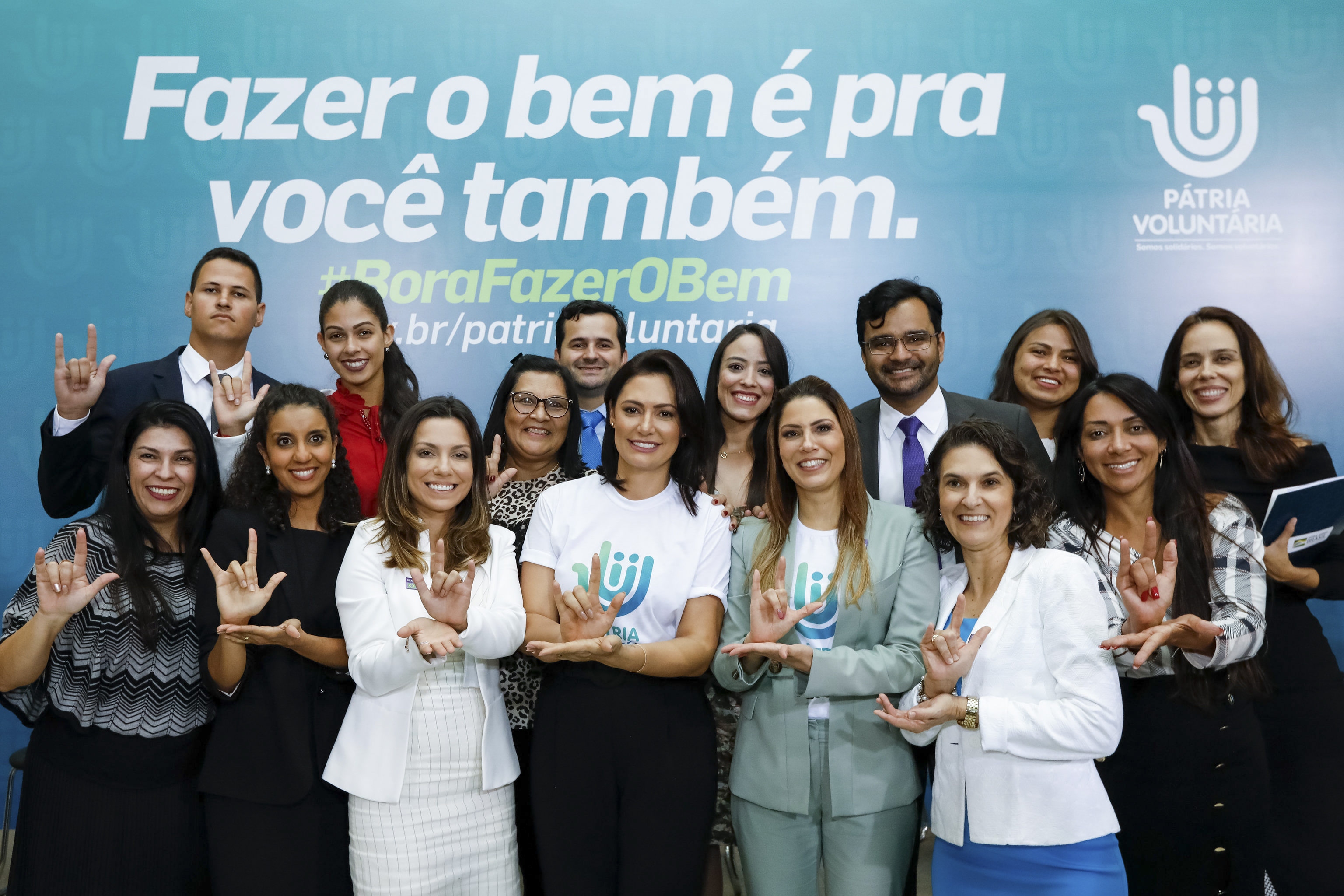 (Brasília - DF, 02/12/2019) Primeira-Dama Michelle Bolsonaro, durante cerimônia de Comemoração ao Dia Internacional do Voluntariado.